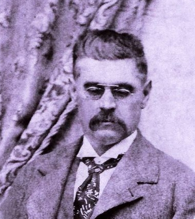 Foto di fine '800 di Filippo Mastellari